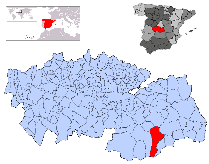 Madridejos en la provincia de Toledo